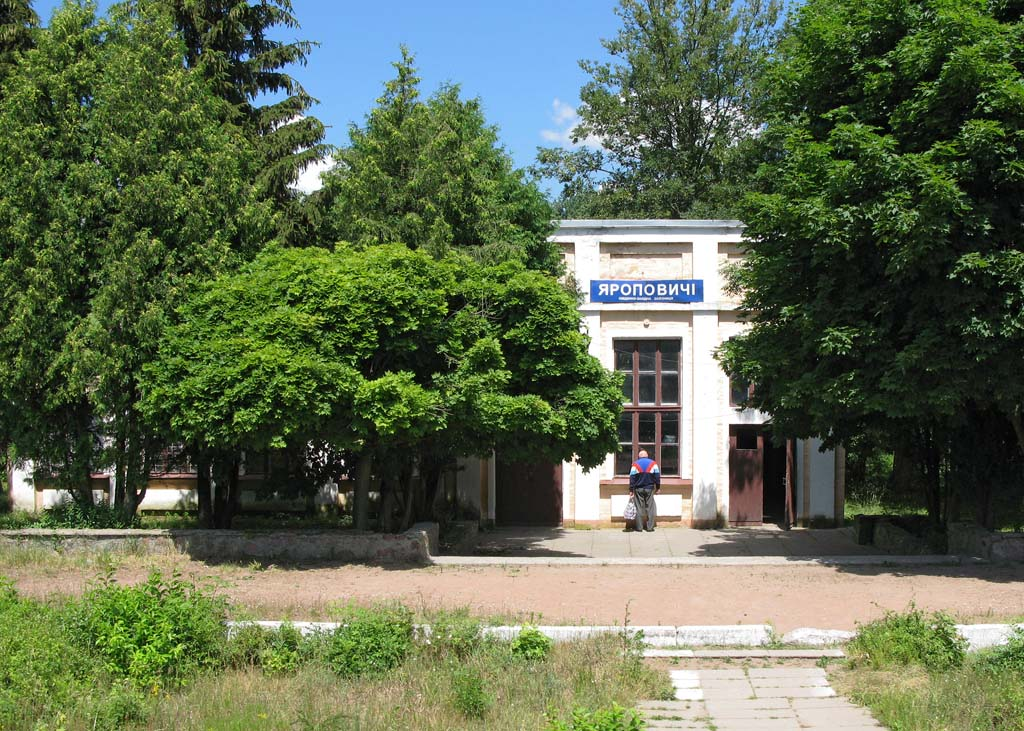 Пасажирська будівля